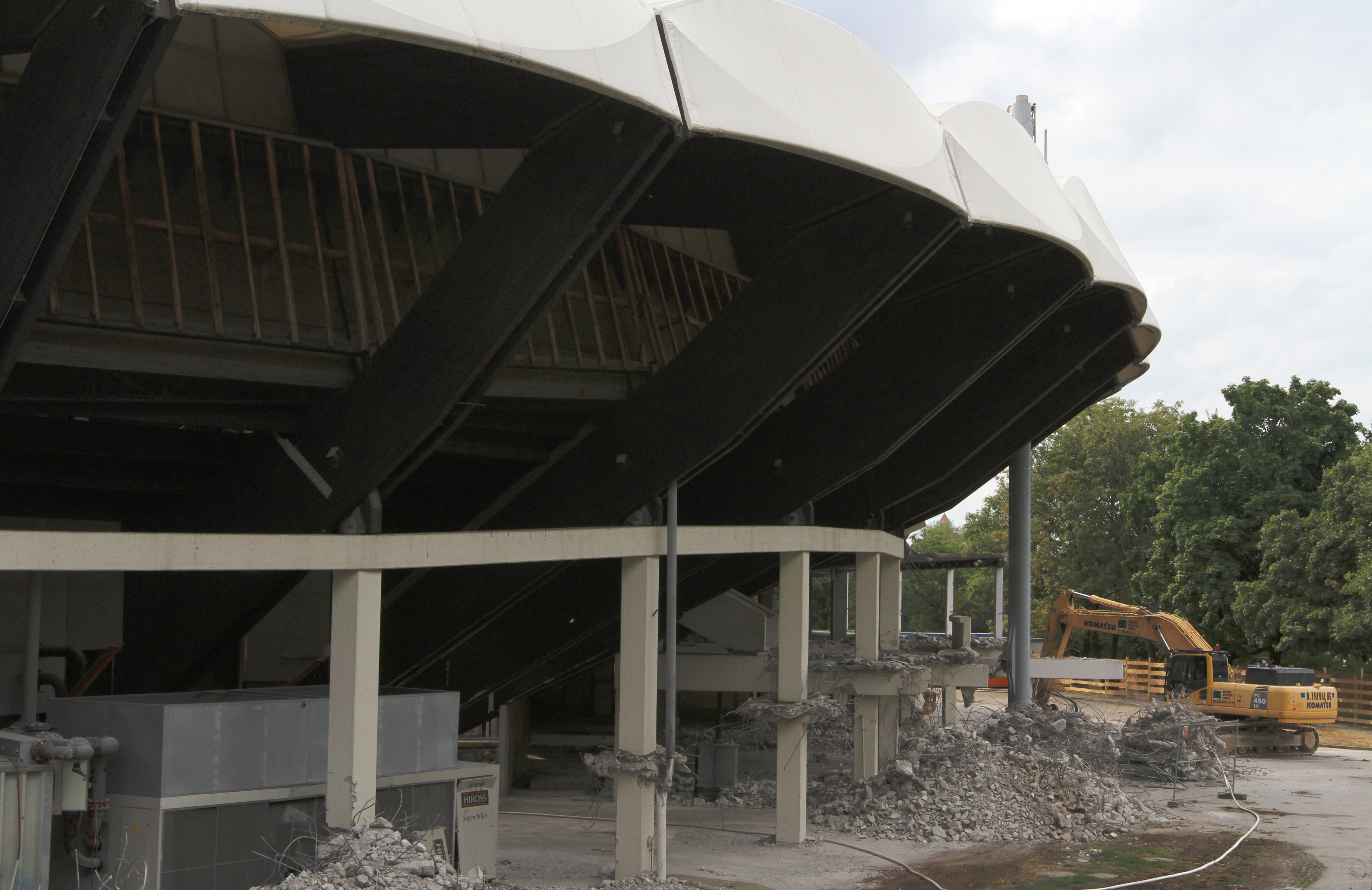 Ehemaliges Olympisches Radstation München. Errichtet für die Olympischen Sommerspiele 1972, stillgelegt, zeitwilig als Event-Arena genutzt, abgerissen 2015.